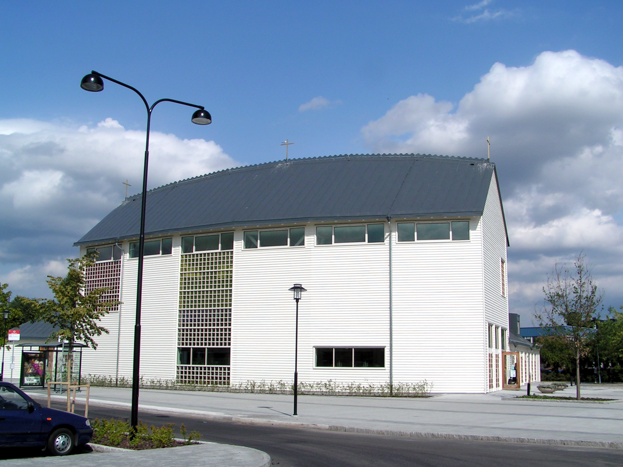 Viksjö kyrka in Järfälla kommun in northern Stockholm, Sweden